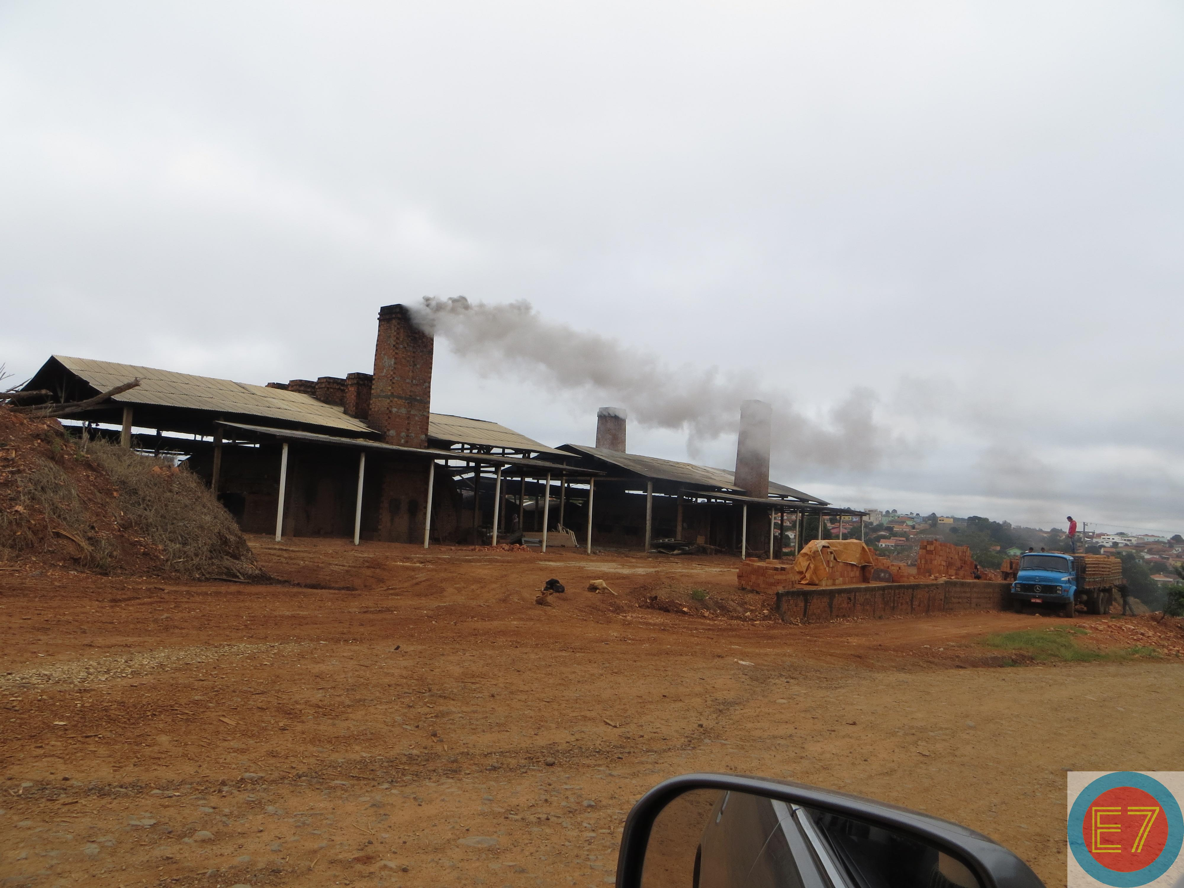 Olaria em Curiúva, Estado do Paraná, Brasil.